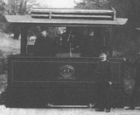 Dampflokomotive Mecklenburgische XVIII der Mecklenburgischen Bäderbahn Molli.